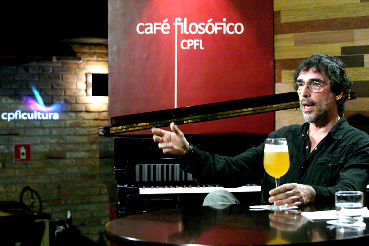 Lobão. Foto: Damião Francisco